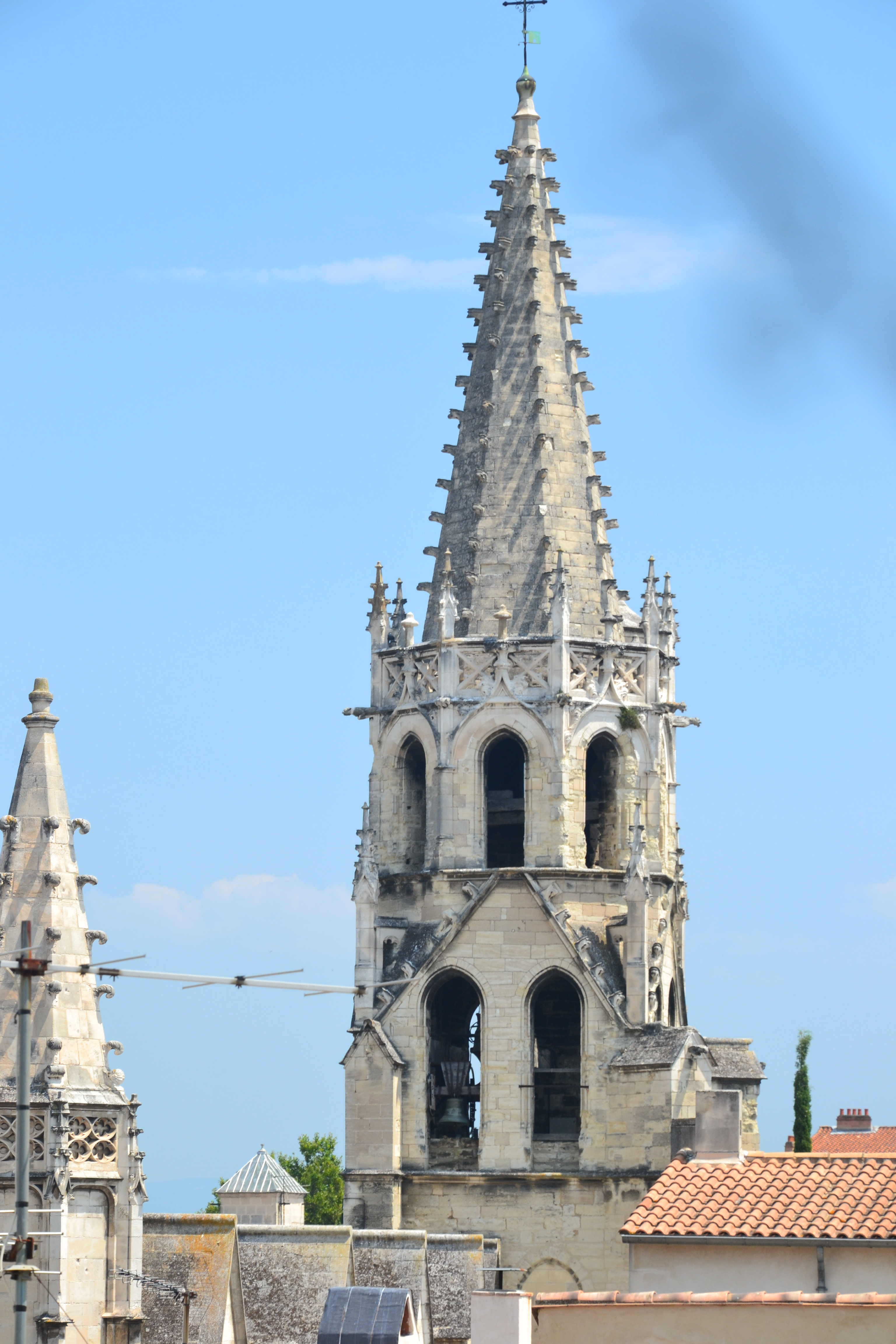 église Saint Pierre d'Avignon .